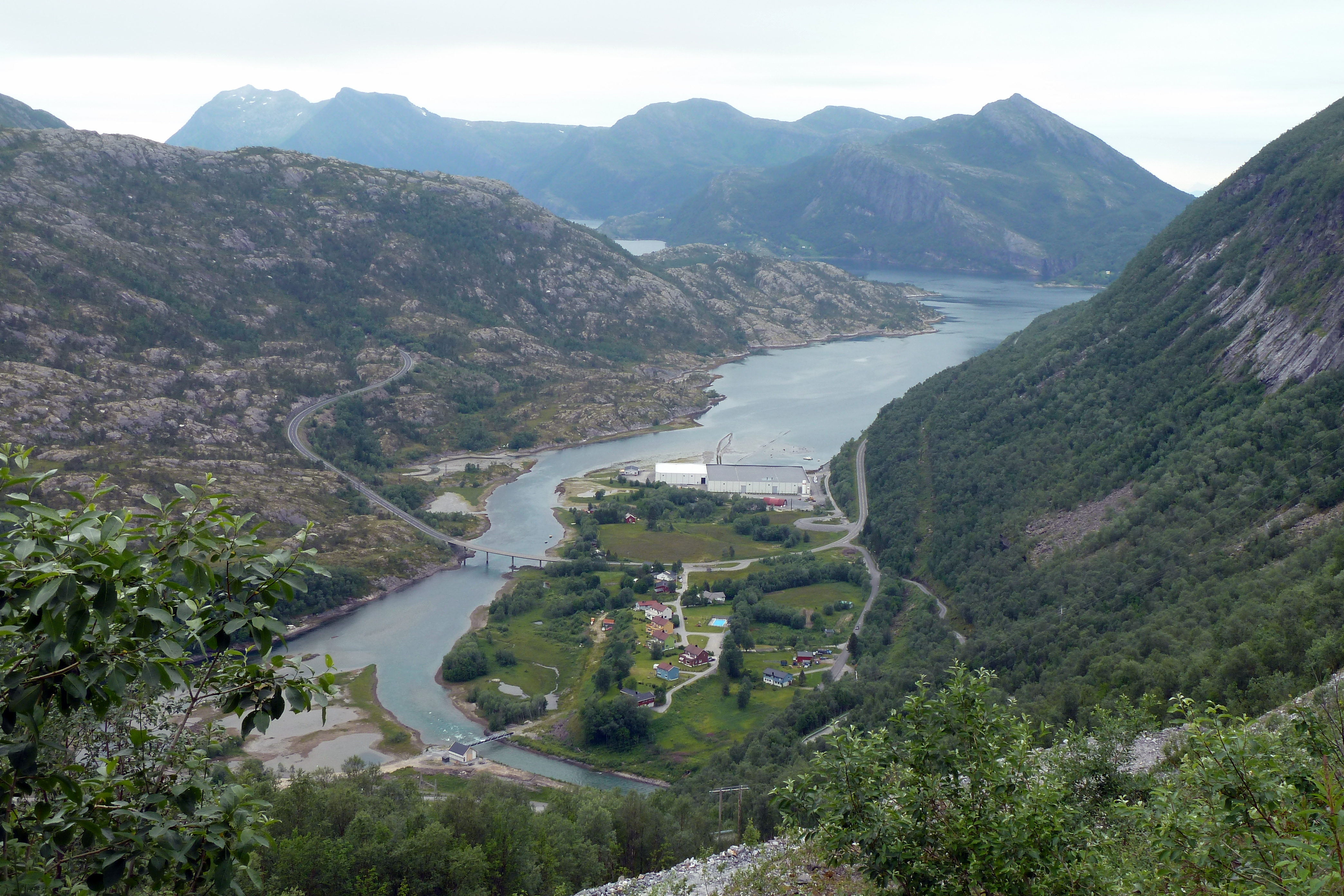 Sundsfjorden i Gildeskål, Nordland.